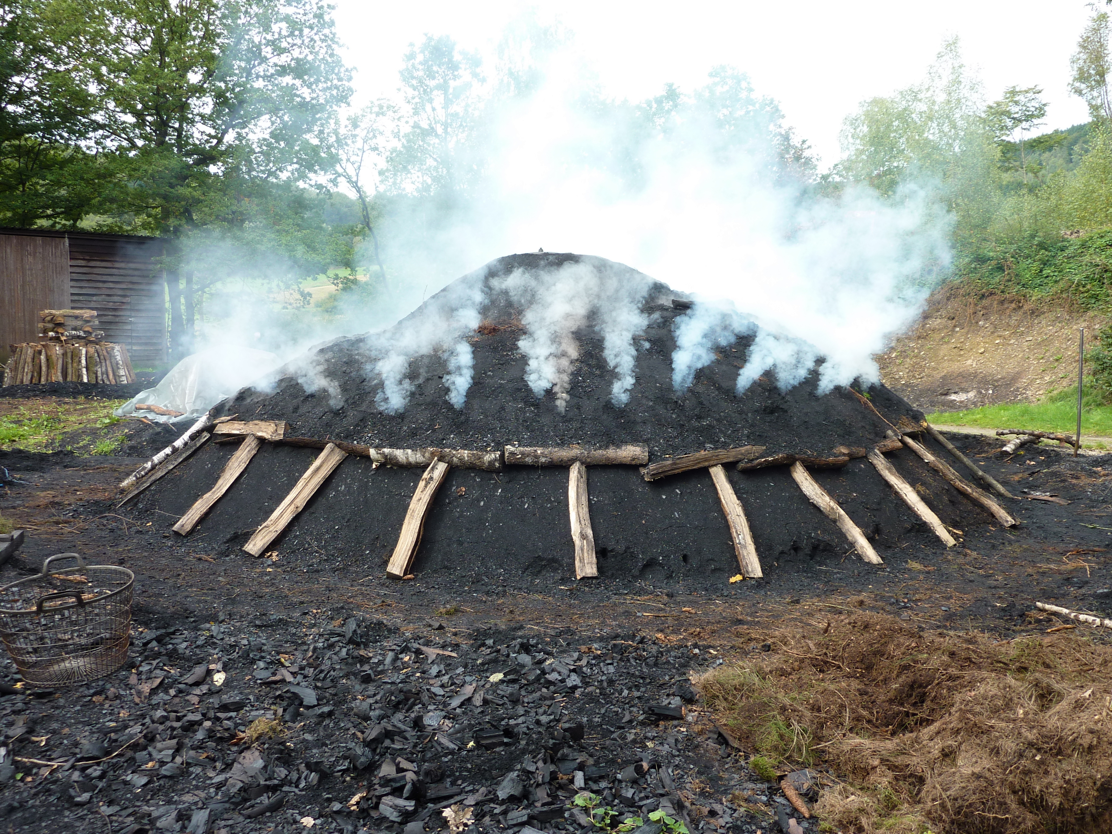 Gemeinde Walpersdorf (Netphen)/Westfalen: Nahe dem Ort wird nach traditioneller Art Holzkohle in Meilern durch kontrolliertes Abbrennen von jungen Birken-, Eichen- und Buchenstämmen hergestellt.